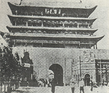 太原承恩门